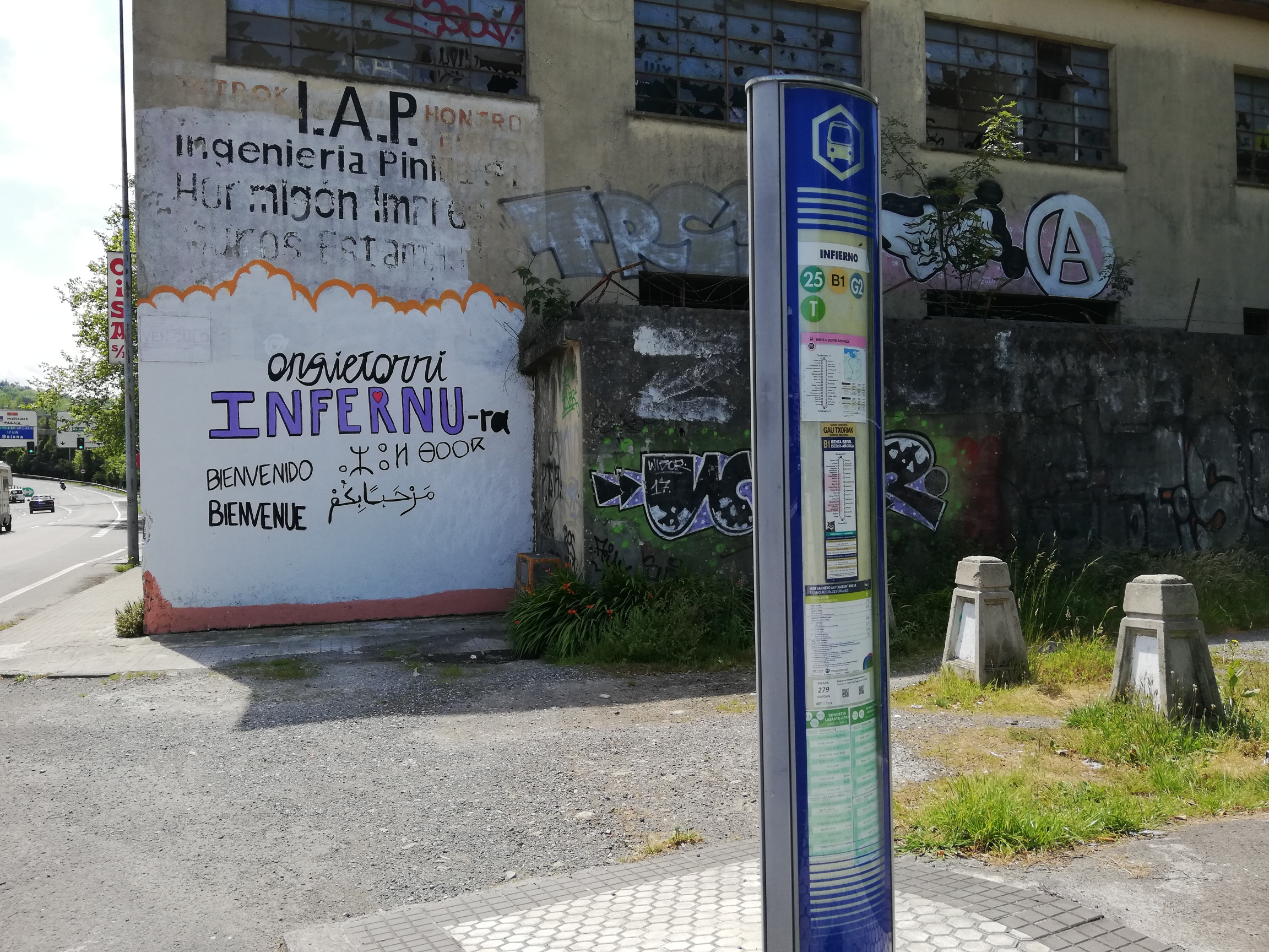 Infernu auzoko ongi etorrria.